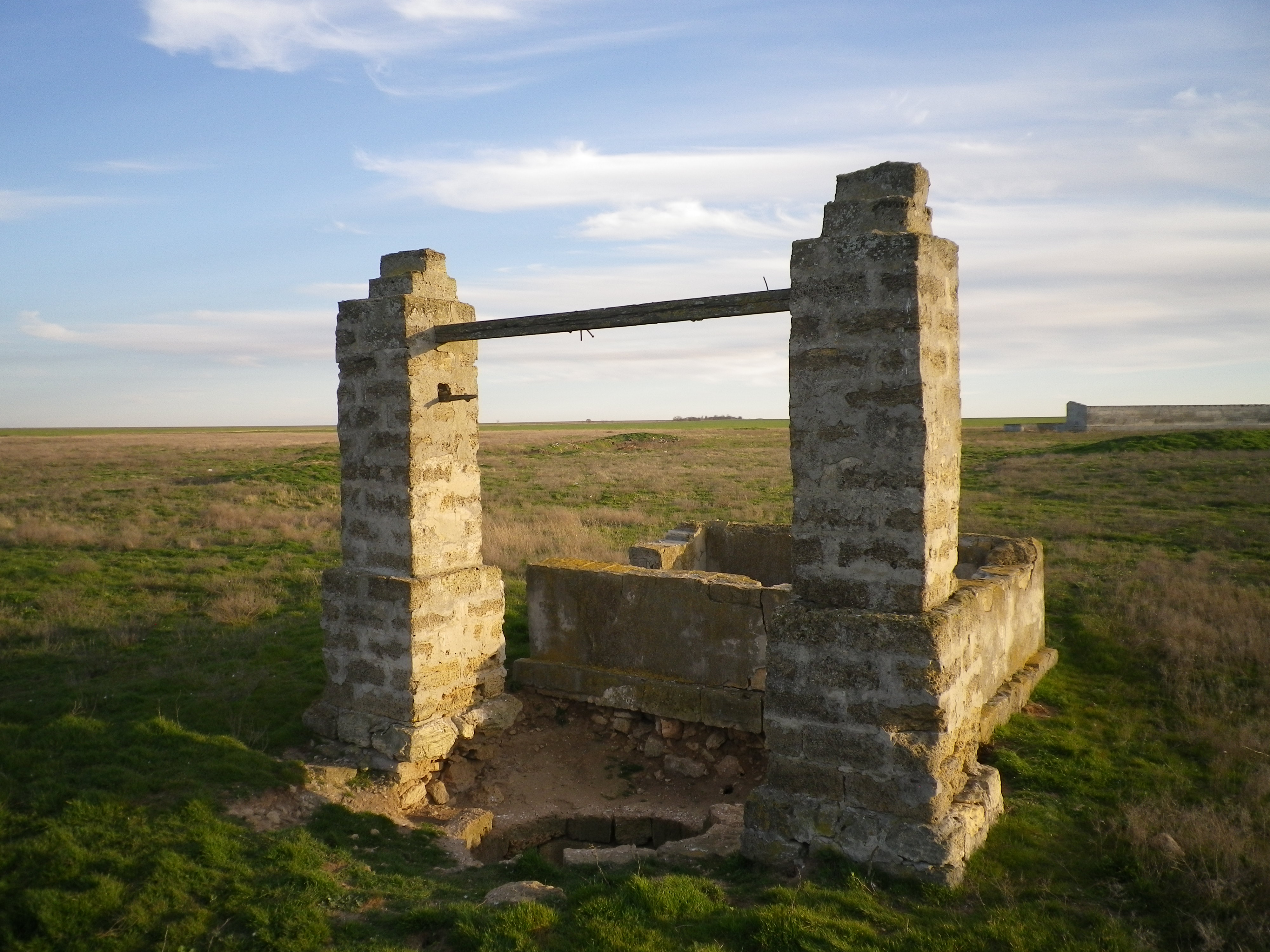 Колодец бывшего села Морозово, Черноморский район, Крым.